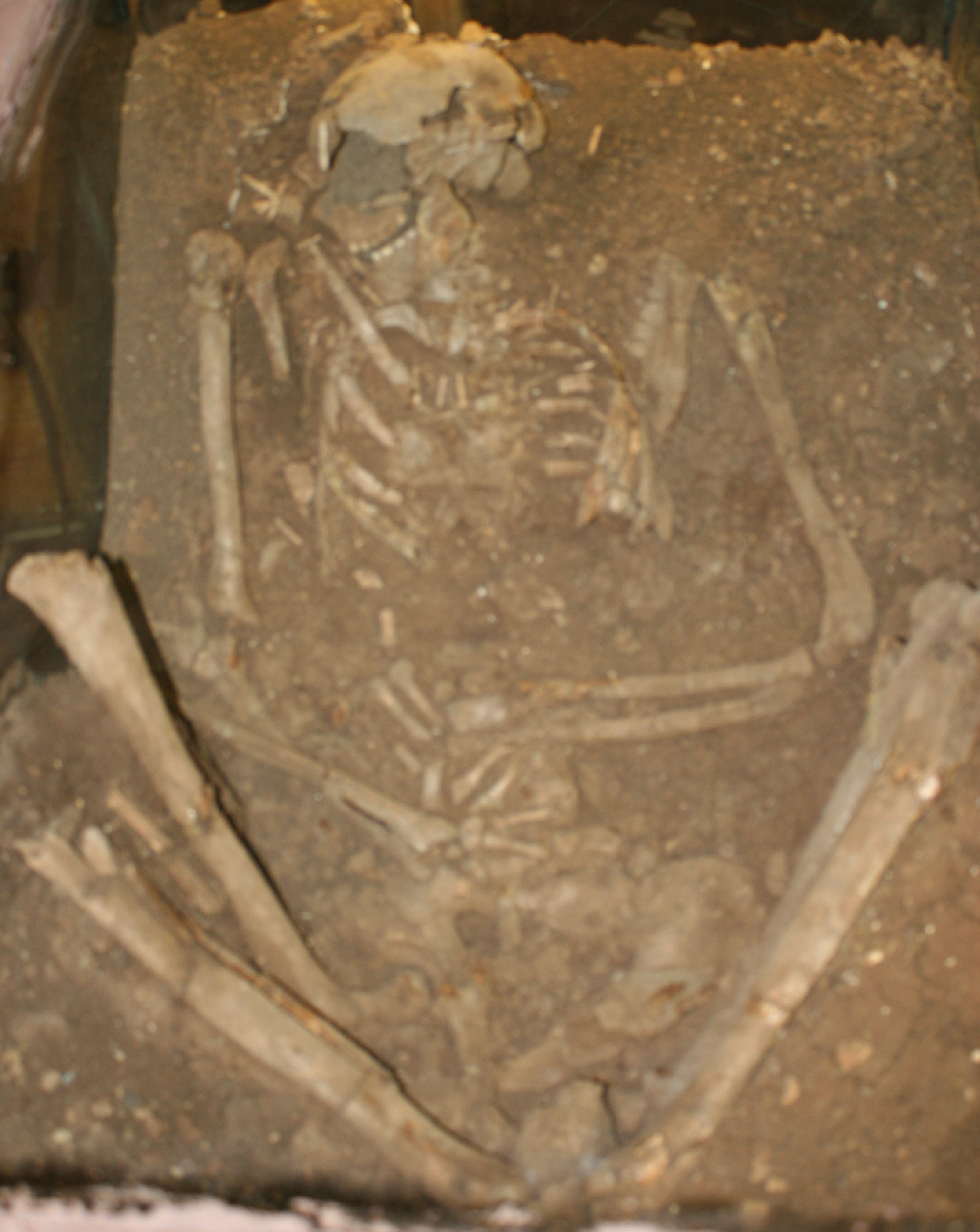 שלד של מבוגר שנמצא באתר עינן -מוזיאון האדם הקדמון במעיין ברוך